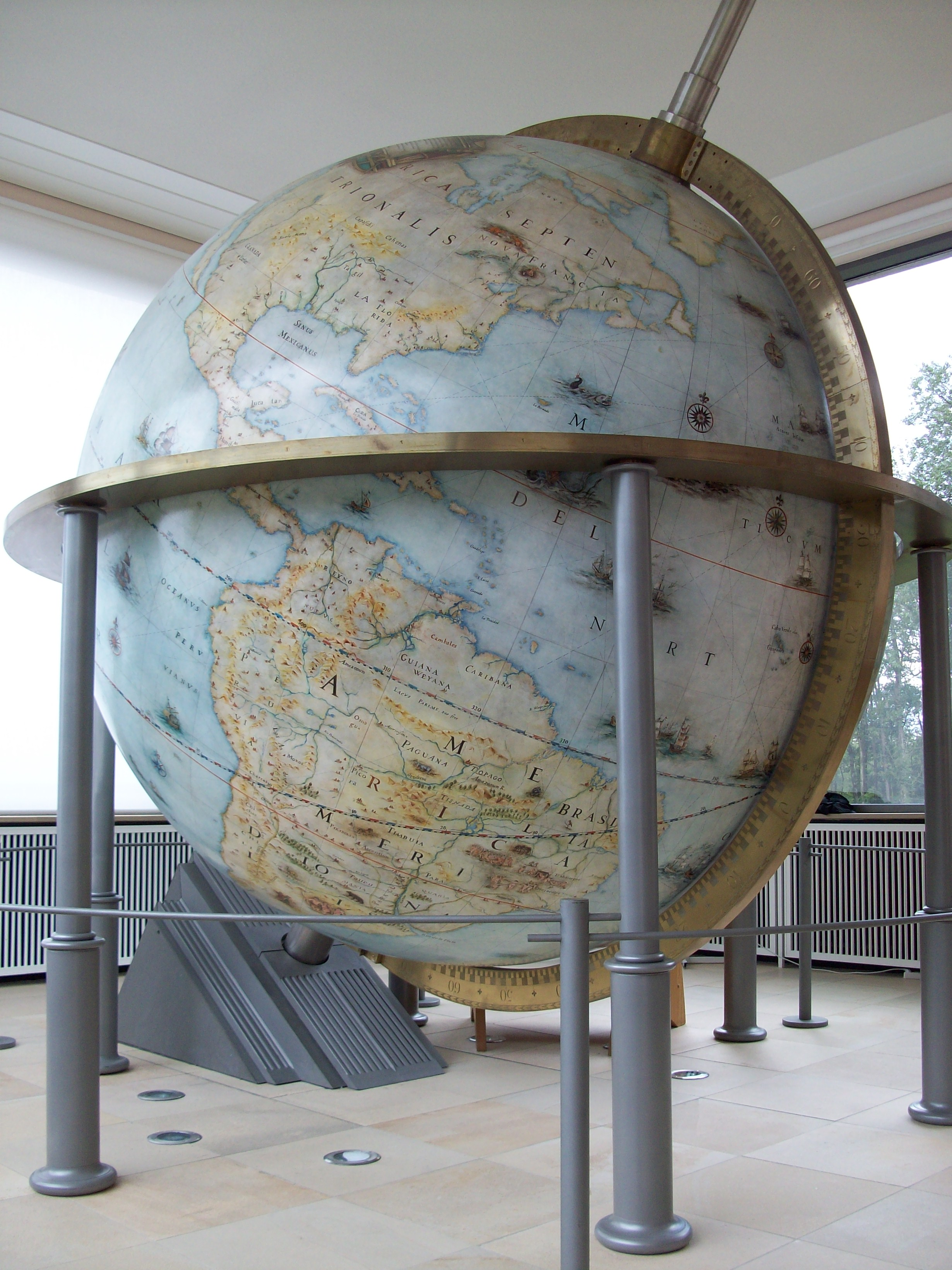 Gottorfer Riesenglobus im Globusmuseum Schloß Gottorf, Schleswig